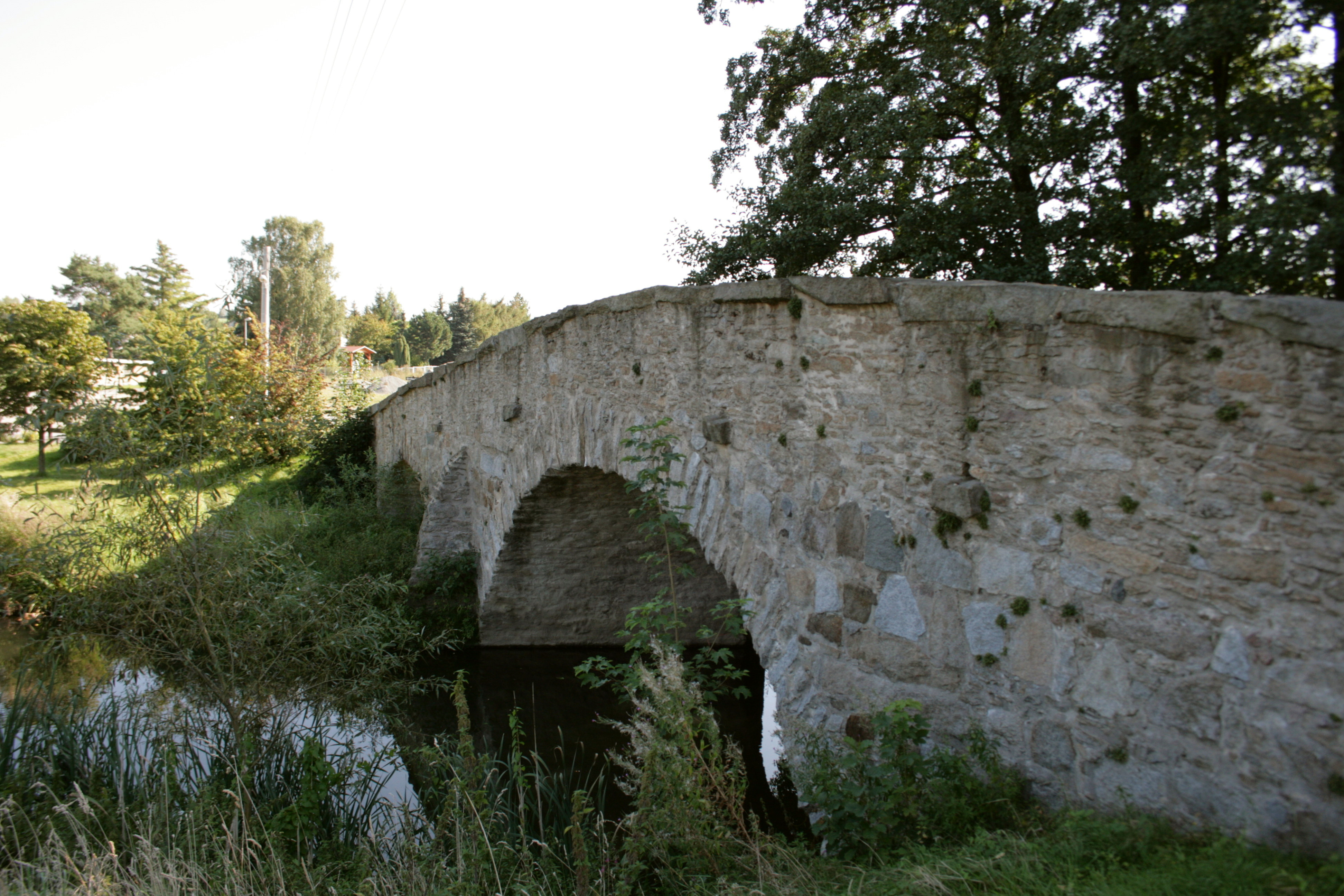 Böhmische Brücke an der Wilthener Straße in Obergurig Hornjoserbsce: "Čěski móst" w Hornjej Hórce.